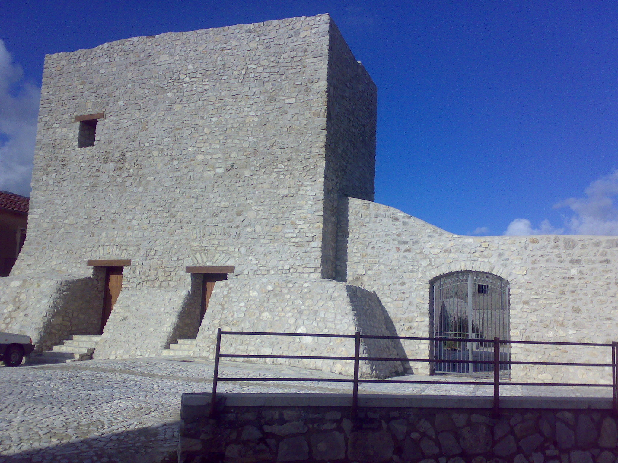 Castello